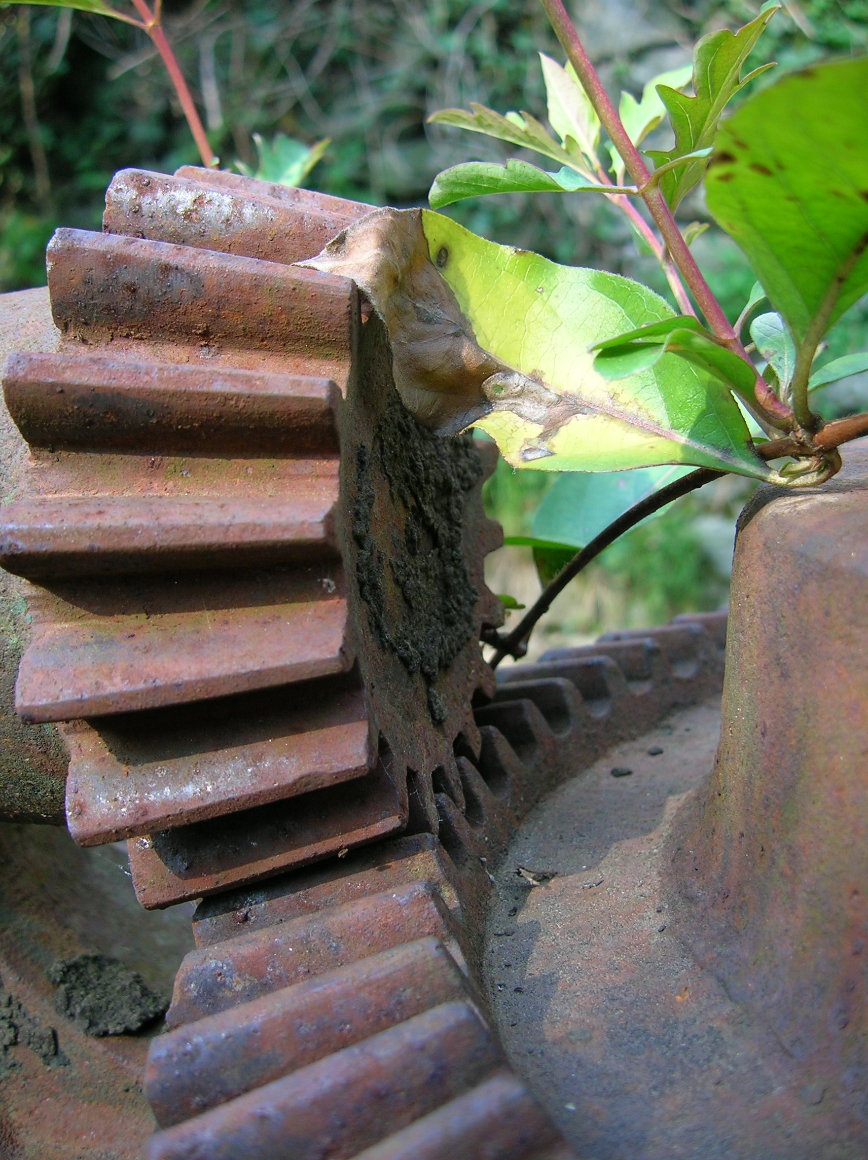 particolare del meccanismo che regolava le chiuse per la presa d'acqua sul fiume Lambro, ad Asso; le chiuse servivano ai filatoi, ora sono inutilizzate.